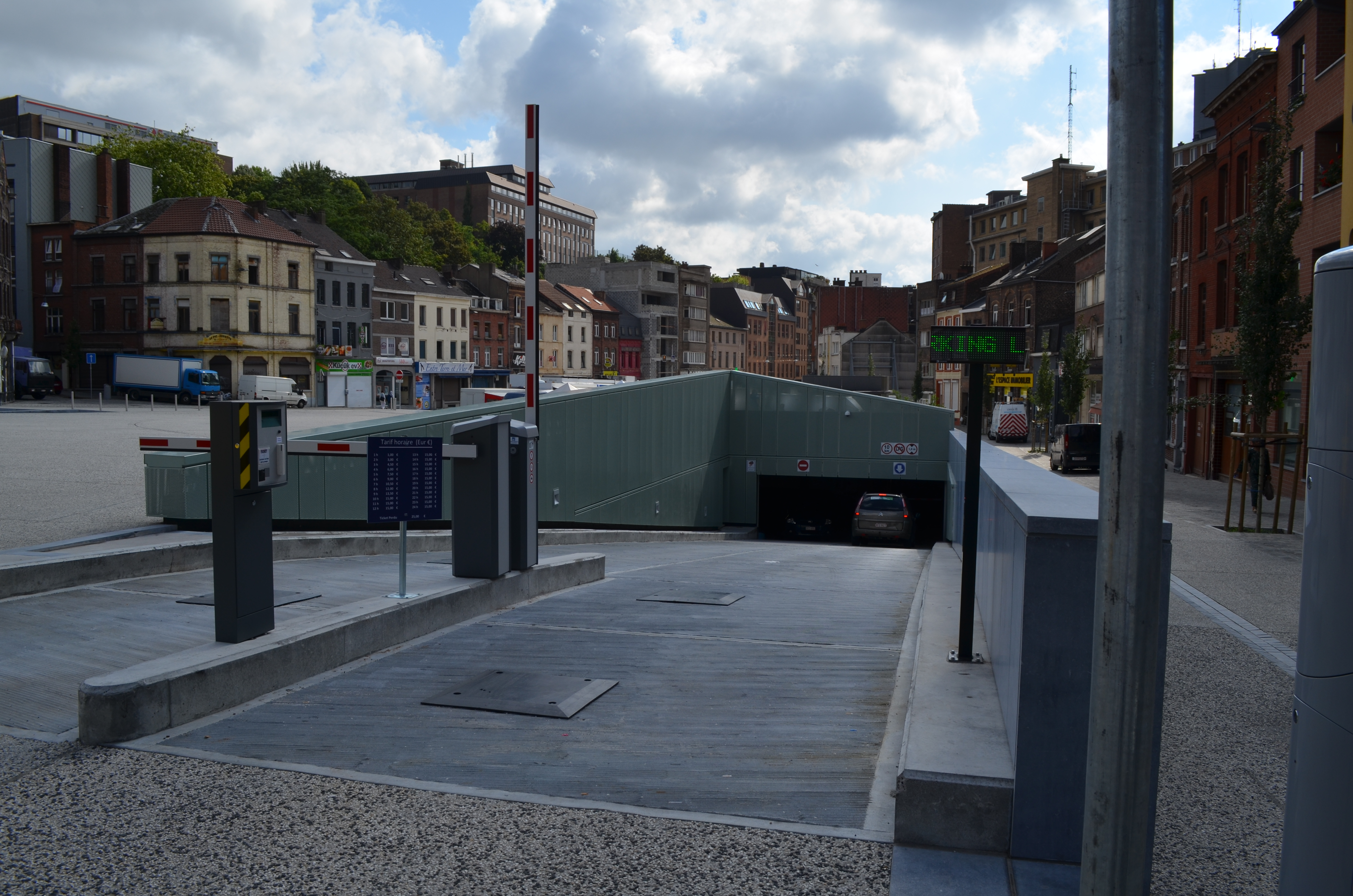 Charleroi (Belgique) - Place de la Digue